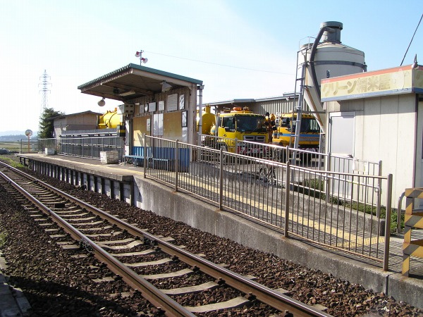 西這田駅。2006年3月25日午後3時25分 (JST) ごろKouchiumiが撮影。